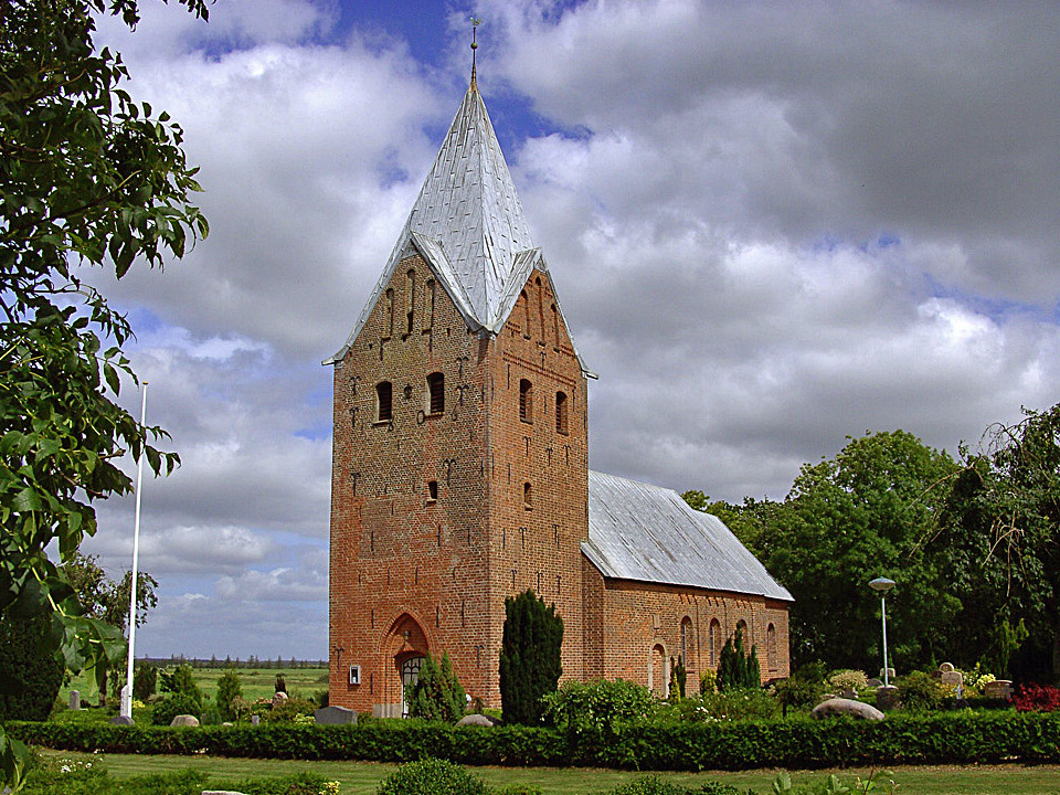 fra sydvest